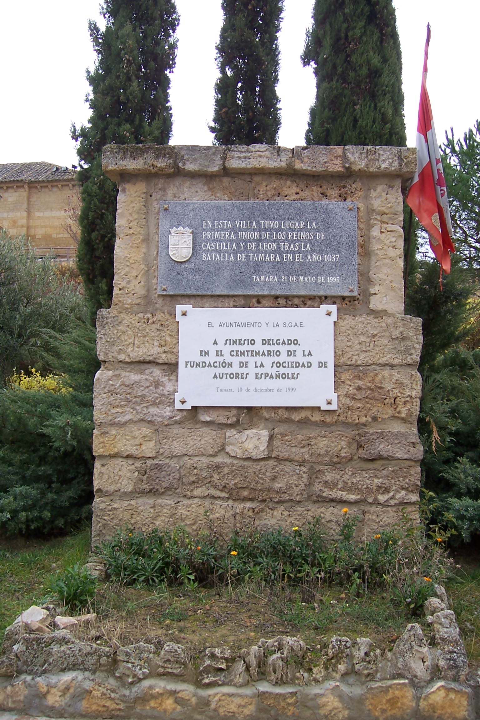 Támara de Campos en la provincia de Palencia. Homenaje a Sinesio Delgado, fundador de la SGAE y escritor (1859-1928).